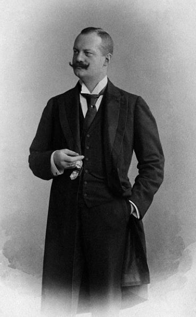 Willibald von Dirksen, 1903. Photographie von J. C. Schaarwächter